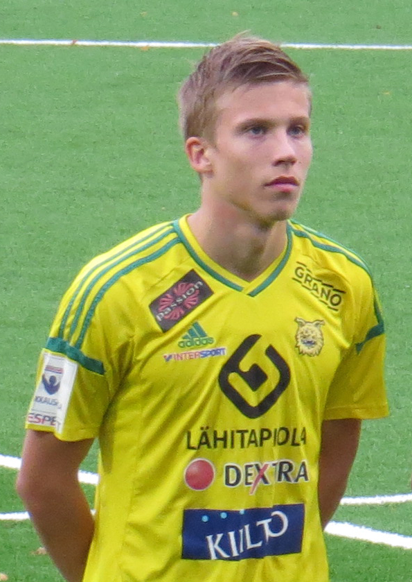 Lauri Ala-Myllymäki, suomalainen jalkapalloilija Tampereen Ilveksen joukkueessa kaudella 2015.